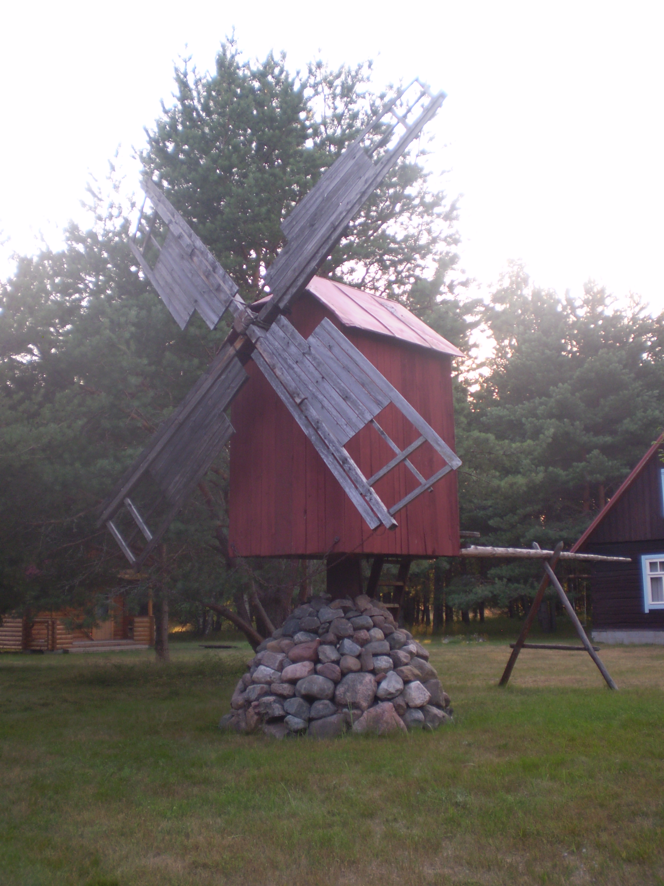 Õngu tuulik